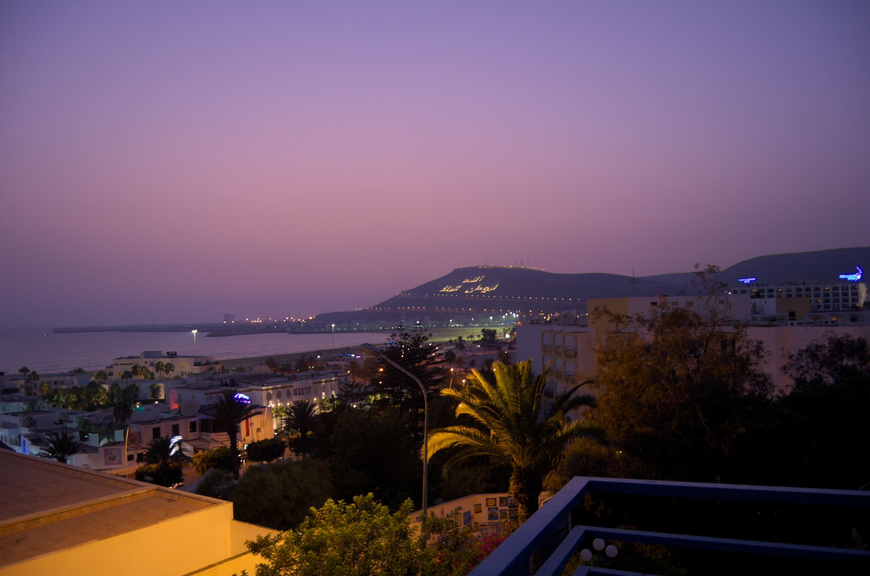 Nocny widok na kazbę w Agadirze